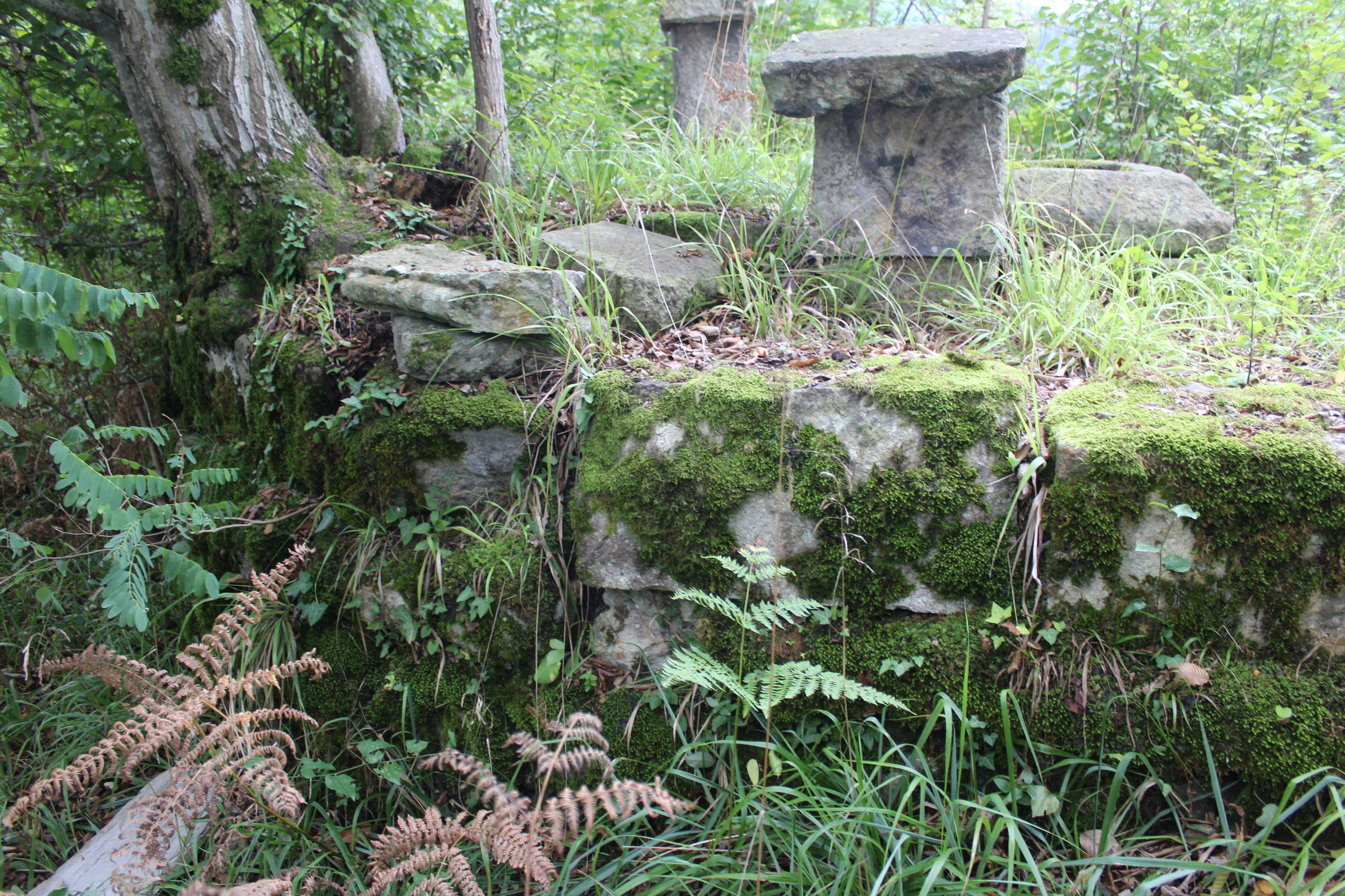 გორისფერდის ეკლესიის ნანგრევები, სოფელი შემოქმედი